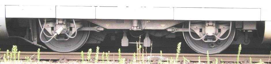 Das Drehgestell eine Triebkopfes des ICE 1 (BR 401) der DBAG in Nürnberg.